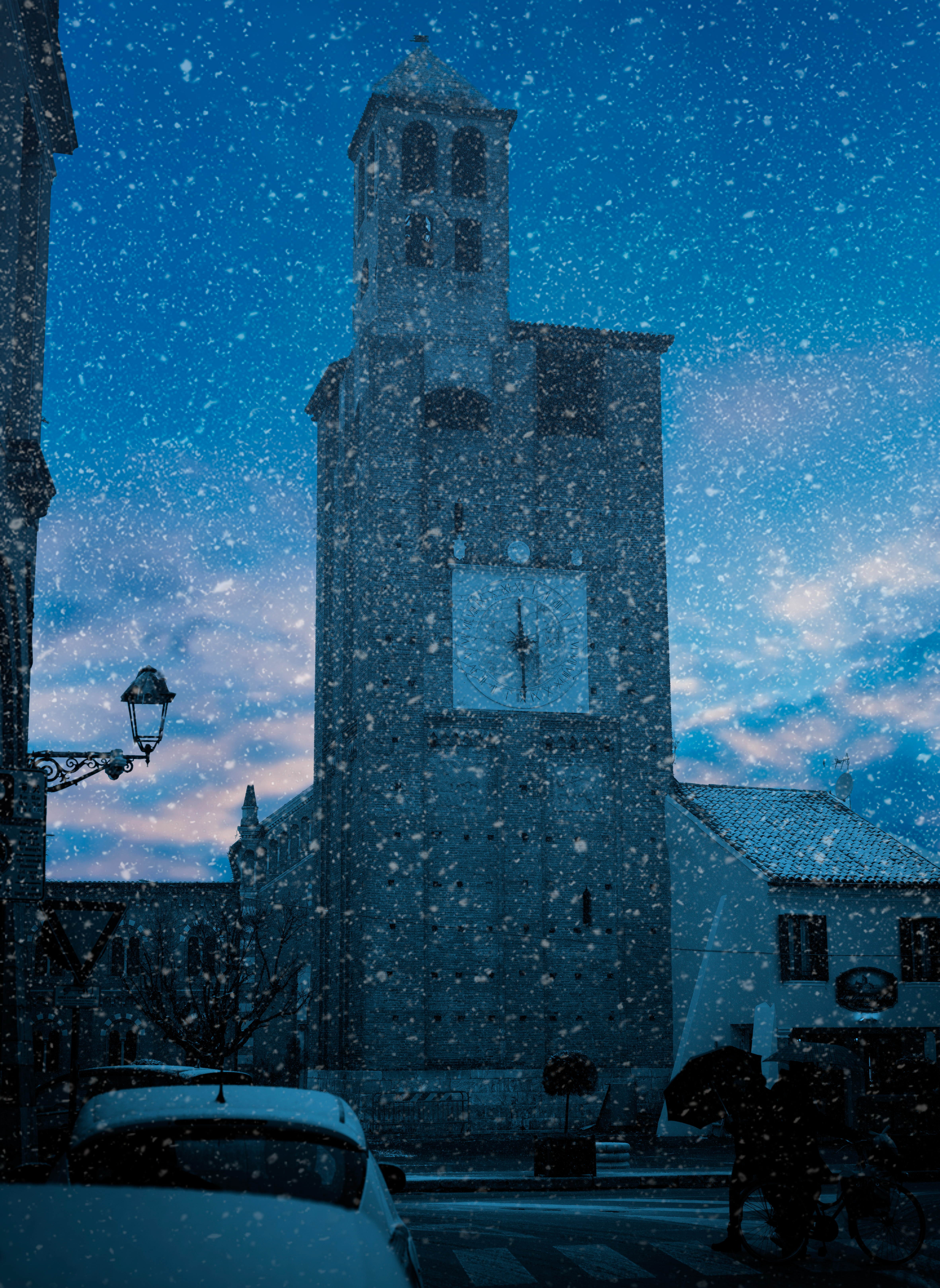 Torre Carrarese in una giornata nevosa